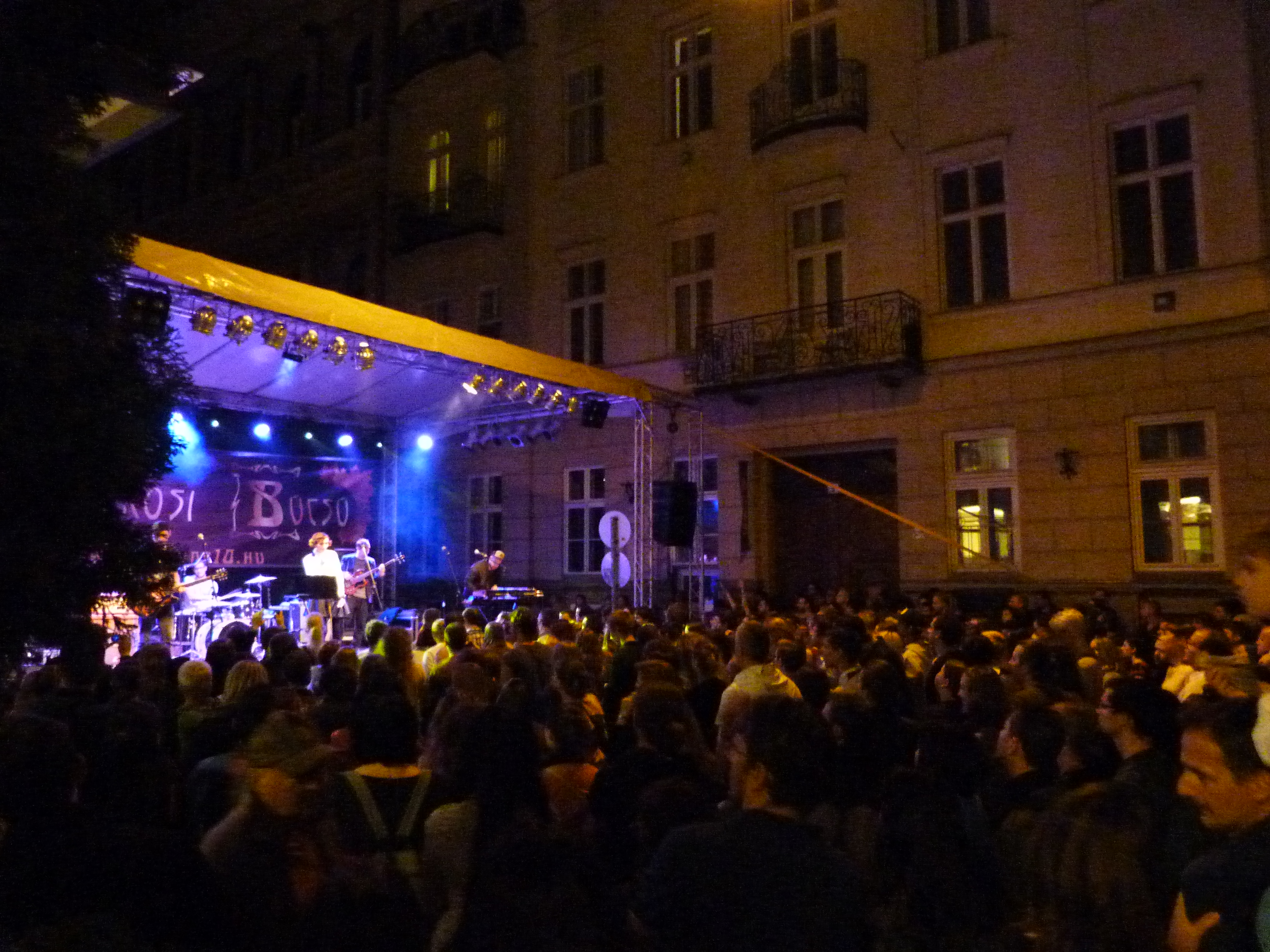 A felvétel 2014. október 11-én, vasárnap készült Budapesten, a Terézvárosban. Terézvárosi Búcsú, Eötvös utca, az Eötvös utca 10 Kulturális Központ előtt. Magashegyi Underground. Bocskor Bíborka. ©© Derzsi Elekes Andor, Budapest, 2014, A kép és filmfelvételek egészben, vagy részletekben másolását, bármilyen úton történő sokszorosítását és felhasználását a szerző ellenérték nélkül, jogutódjaira is kihatóan megengedi. Az engedély kiterjed a kereskedelmi célú hasznosításra is. Kéri azonban nevének feltüntetését a felhasználás során. A Metapolisz sorozat valamennyi képe és filmje Creative Commons alatti valamint kereskedelmi - for profit - célra is felhasználható. Ajánlott hivatkozás: Derzsi Elekes Andor: Metapolisz DVD line